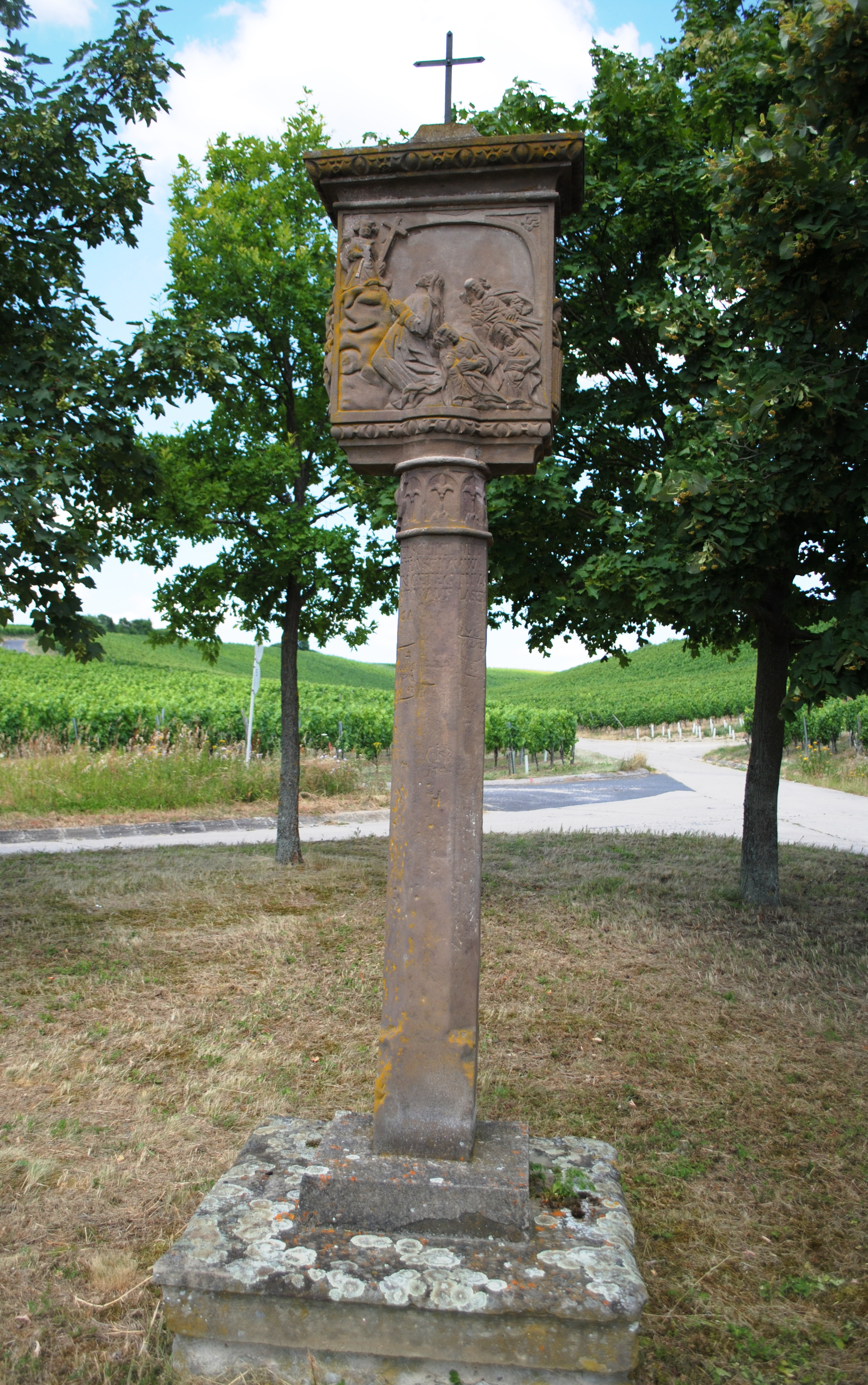 Fahr, Bildstock, Staatsstraße